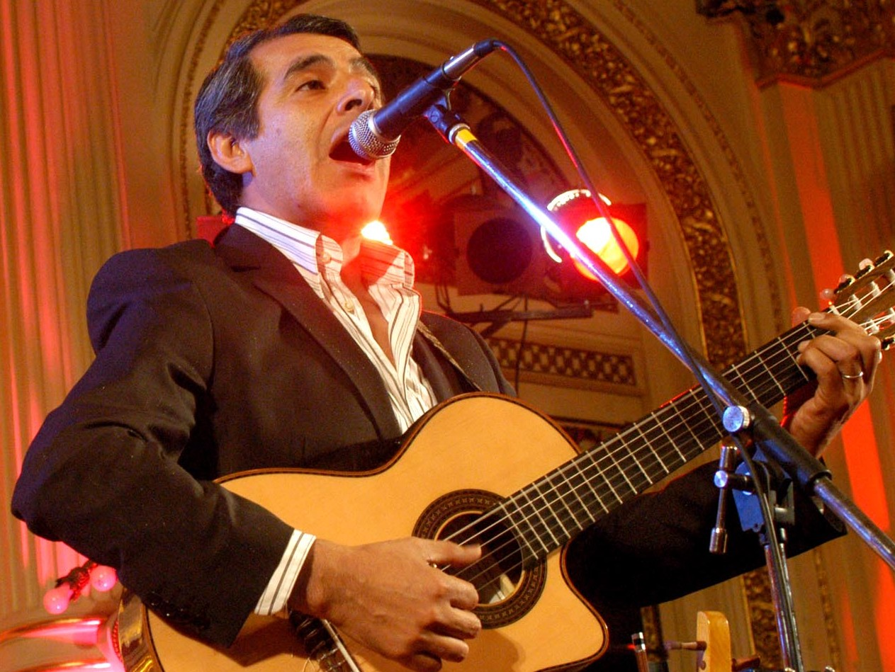 Peteco Carabajal. En la Casa Rosada. Buenos Aires. Argentina. 5 de agosto de 2005. foto oficial